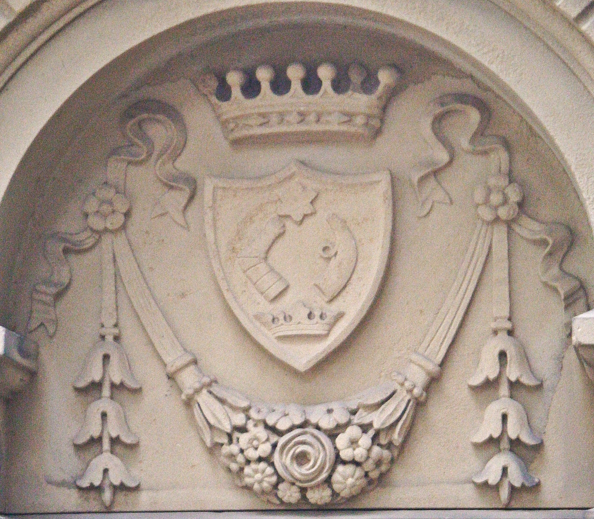 Anna Freiin von Szent-Ivanyi (1797-1889) pfälzische Adelige und Weingutsbesitzerin in Deidesheim. Familienwappen; Detail vom Grabstein in Deidesheim.